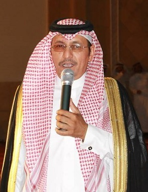 الشاعر راجح المالكي